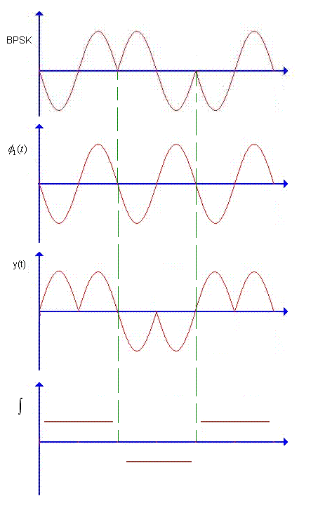 Schemat przykładowych przebiegów sygnałów w demodulatorze BPSK